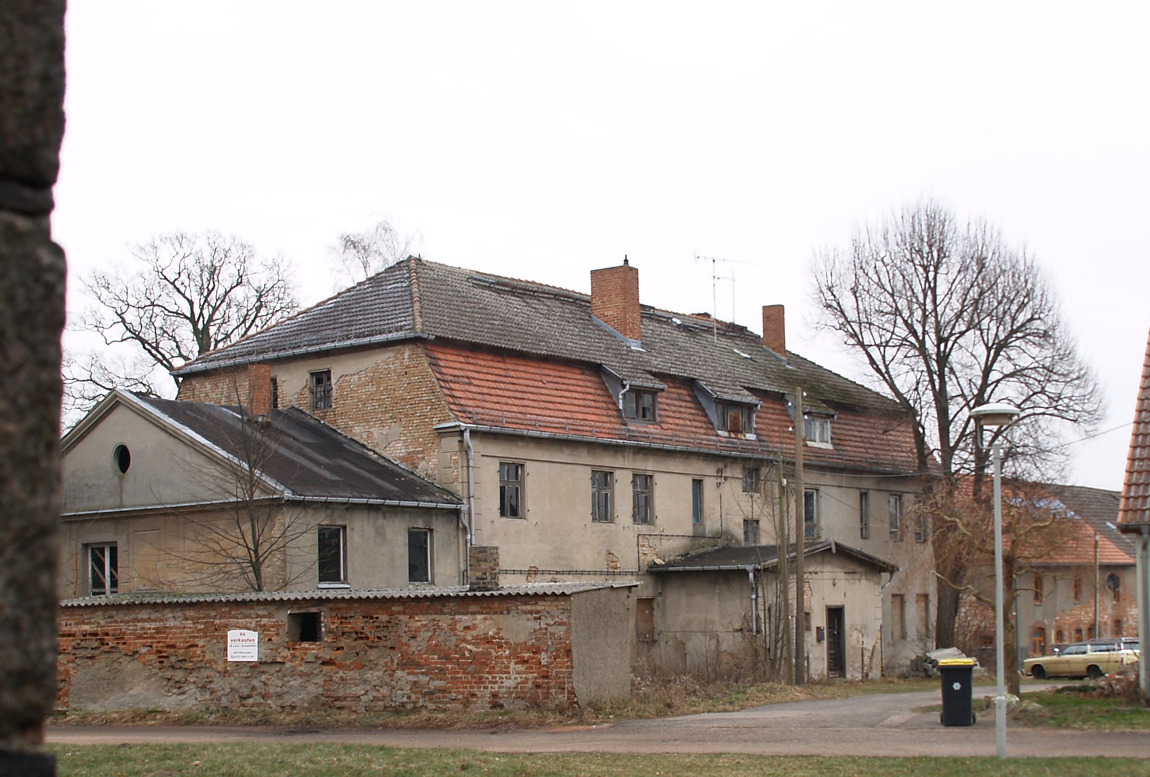 Frontansicht Gutshaus Buskow